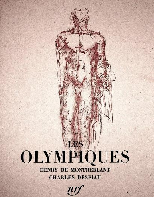 Page de titre de l'édition de 1943 de Les Olympiques de Henry de Montherlant. Lithographie de Charles DESPIAU (1874-1946). Éditeur NRF